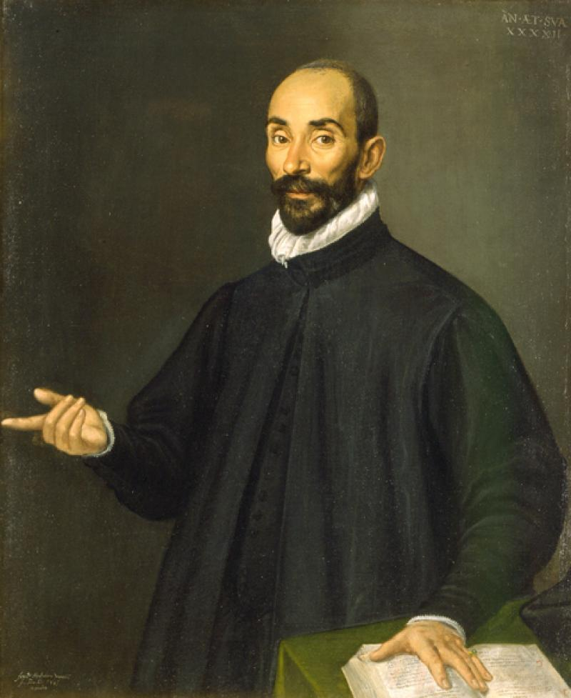 Francesco Apollodoro - Ritratto di Ercole Bazzani - 1585 olio su tela - 90 x 110 cm